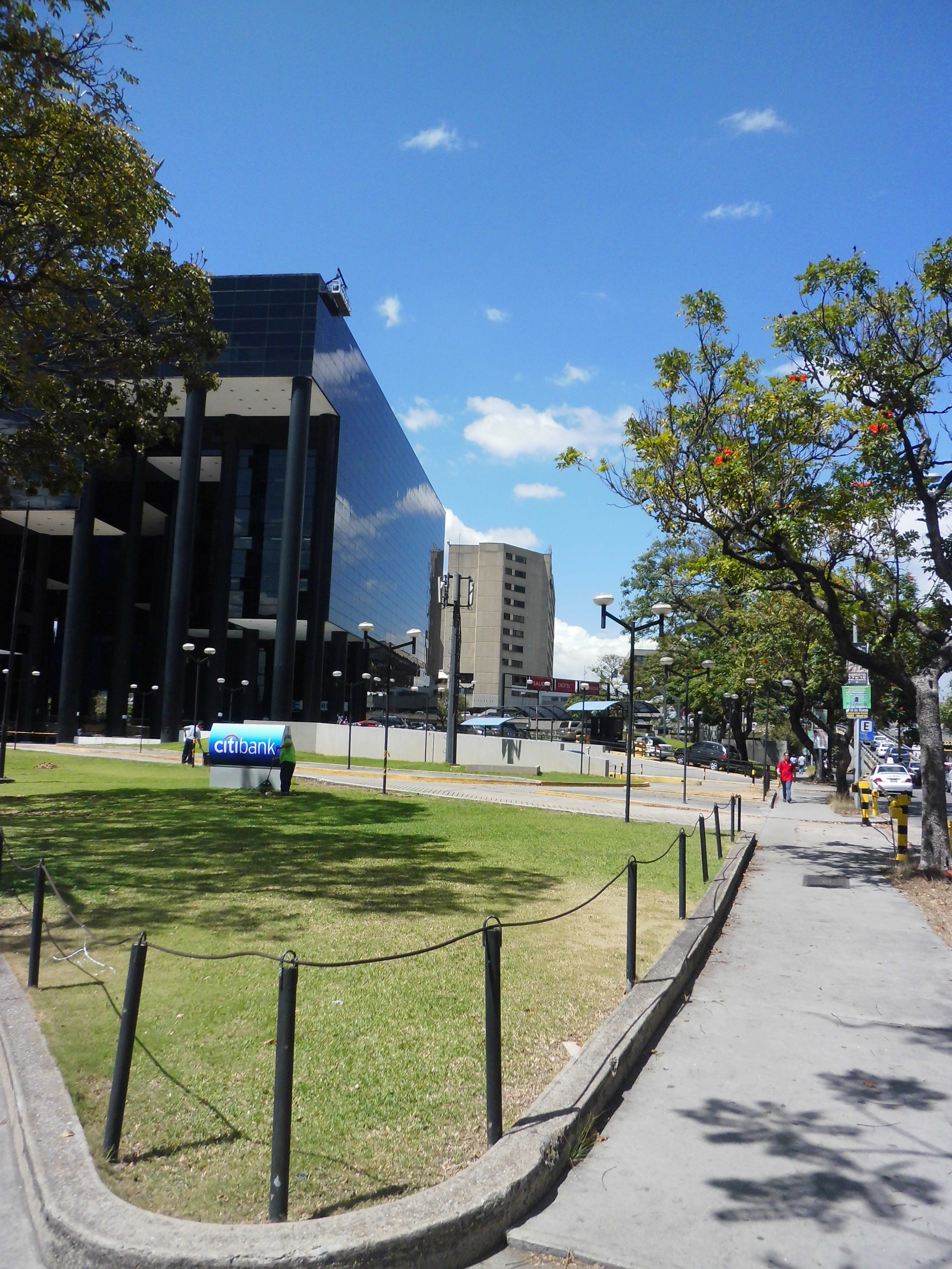 Cubo Negro, municipio Chacao, estado Miranda - Venezuela